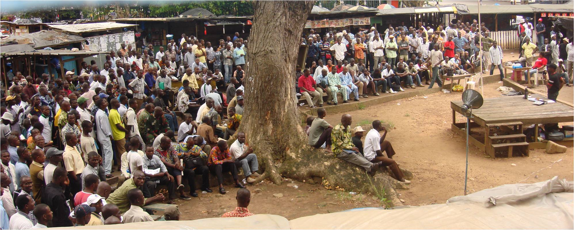 Reroupement de jeunes dans un espace de discussion de rue "Parlement" au Plateau